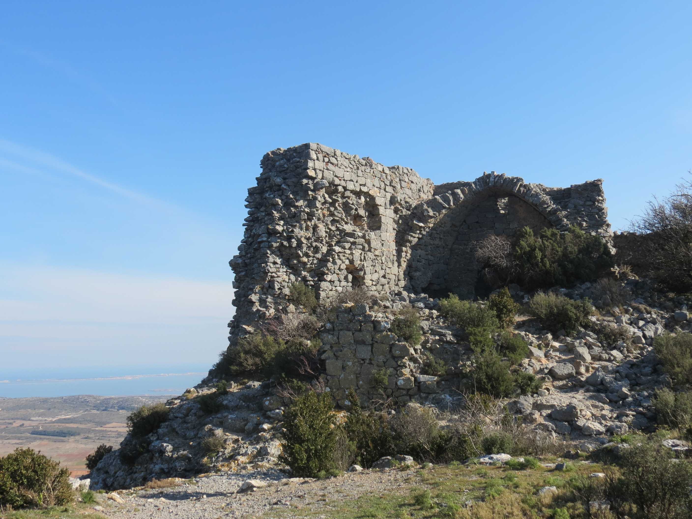 Château de La Salvaterra, Opoul-Périllos, Pyrénée-Orientale, Languedoc-Roussillon, France.